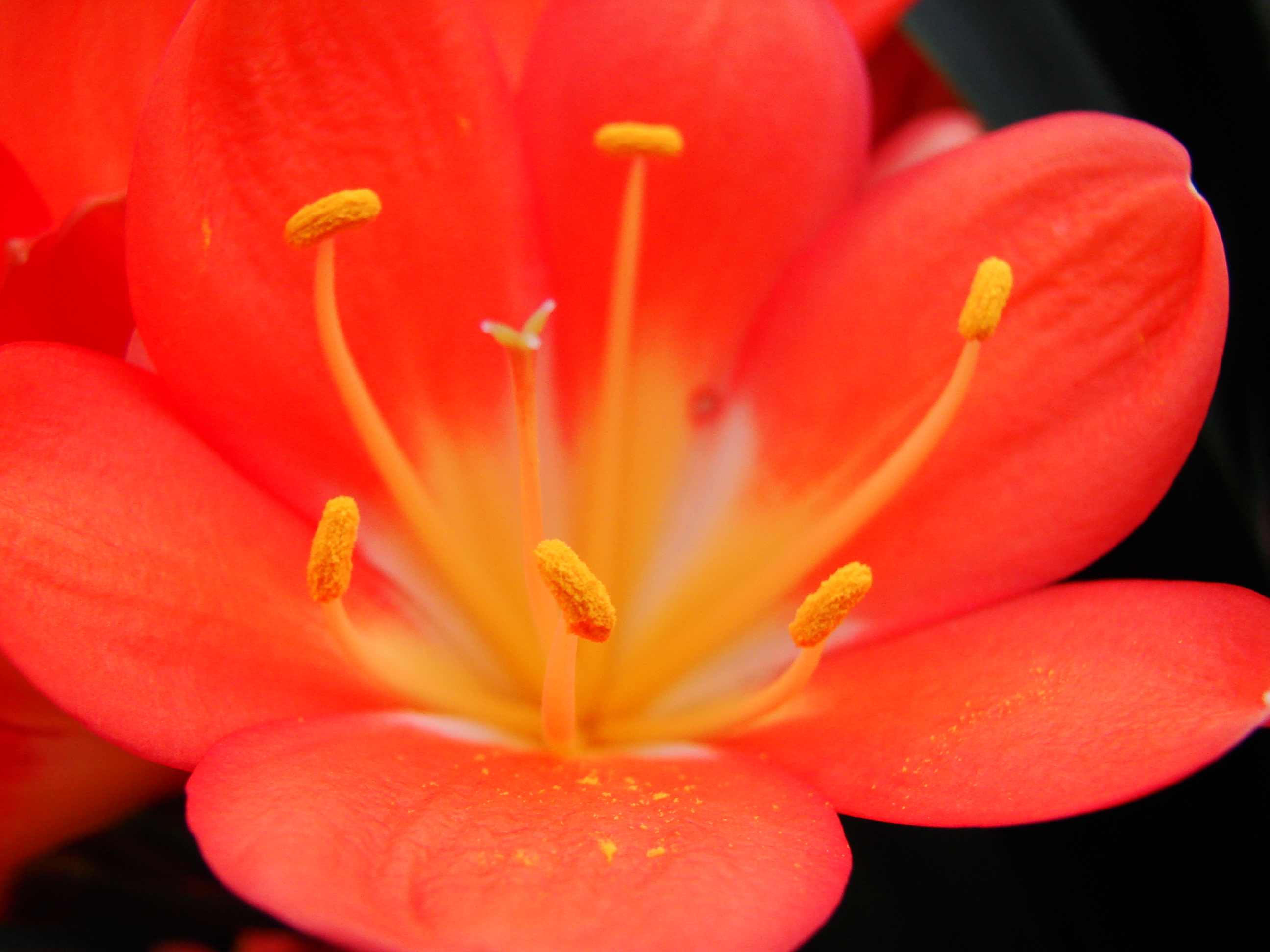 Jardin botanique de l'Université de Zurich (Suisse) : Clivia miniata (Lindl.) Bosse